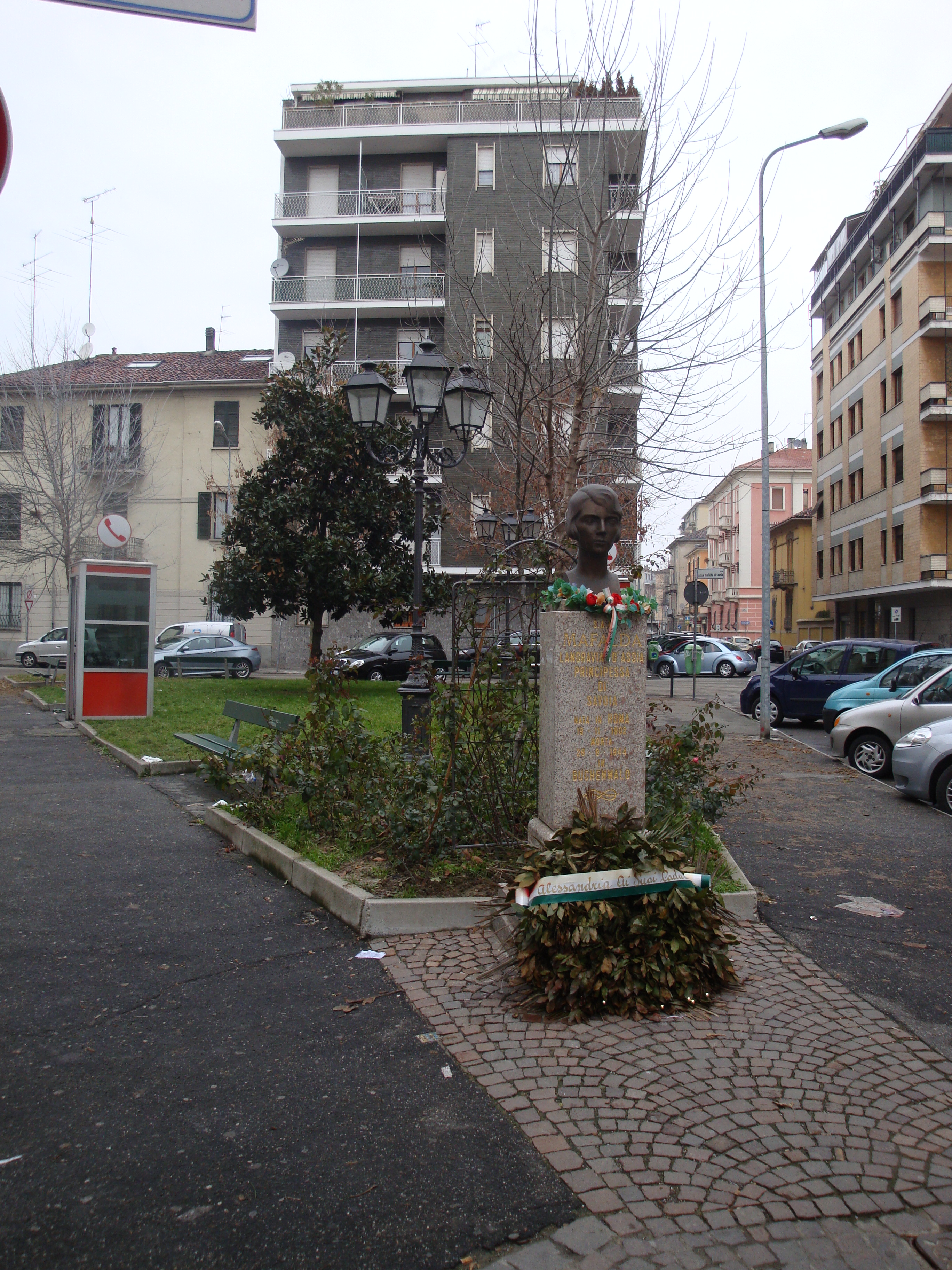 Autore: Tony Frisina - Alessandria